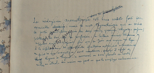 R-M Gattefossé précise l'origine du néologisme "aromathérapie", à l'occasion de la deuxième édition, inédite, de L'Aromathérapie